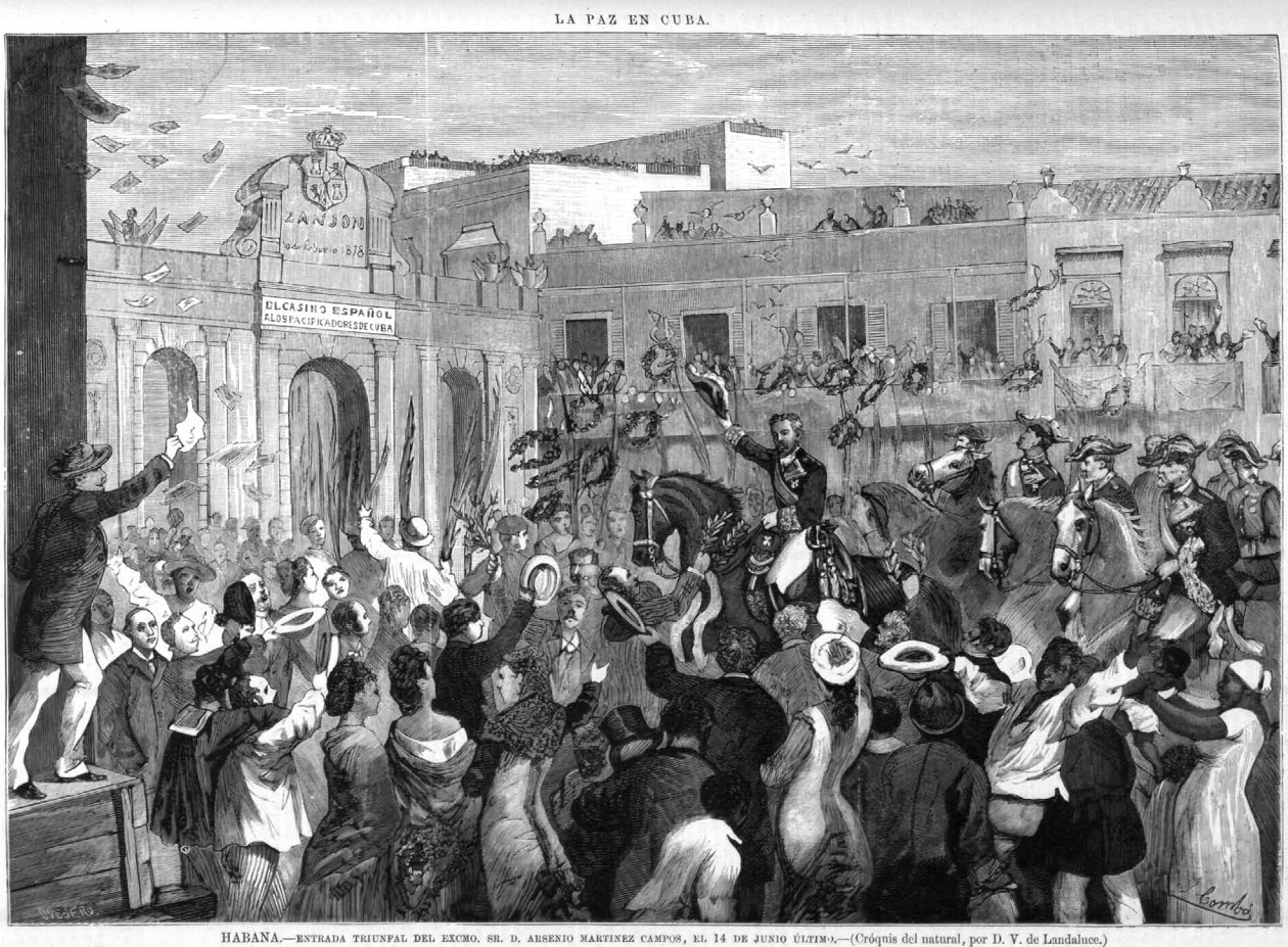 La Habana, entrada triunfal del Arsenio Martínez Campos, el 14 de junio de 1878, tras el final de la Guerra de los Diez Años, croquis al natural de Víctor Patricio de Landaluce, dibujo de Juan Comba García, recogido en la revista española La Ilustración Española y Americana.